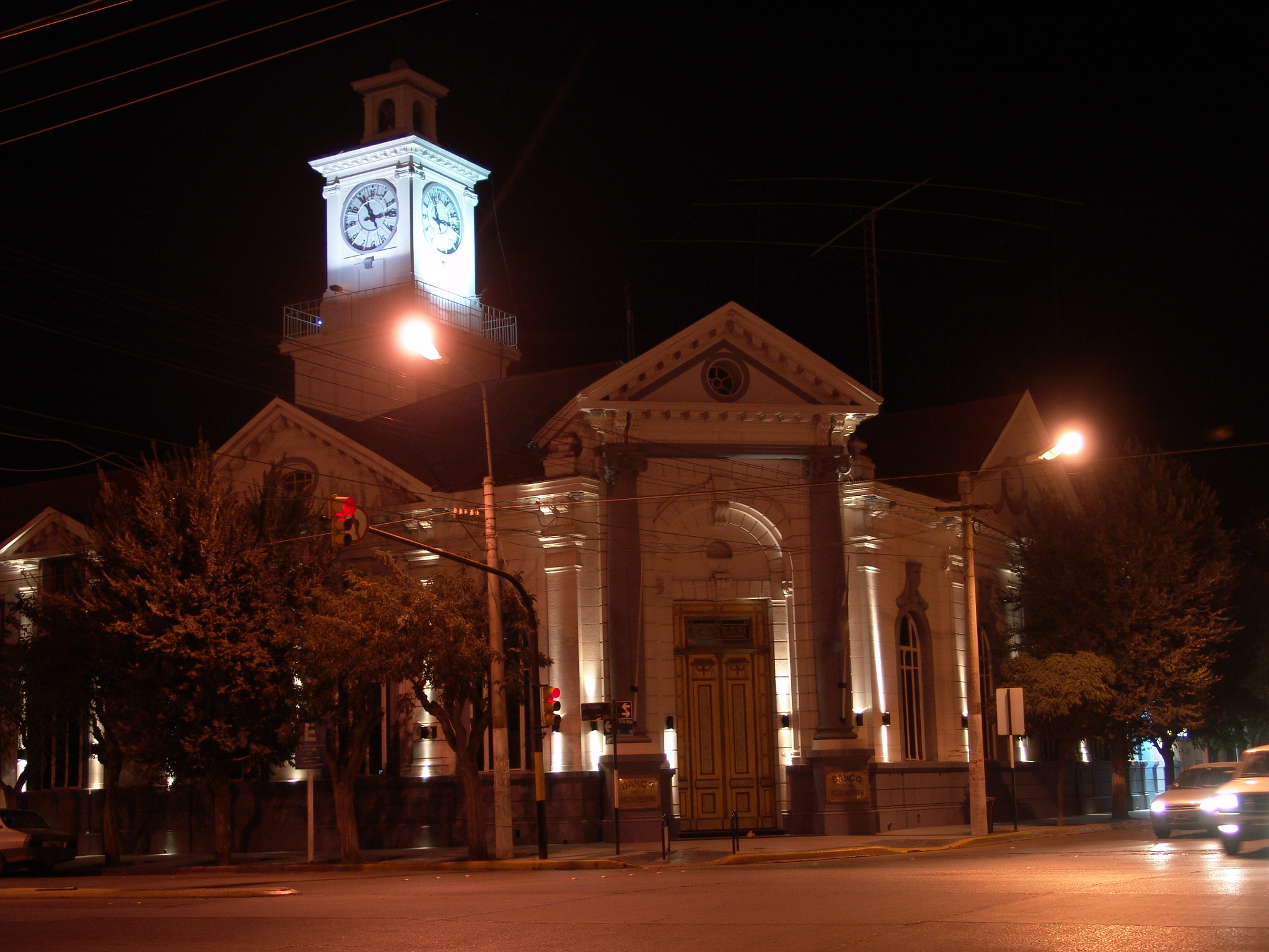 Banco Nacion Trelew